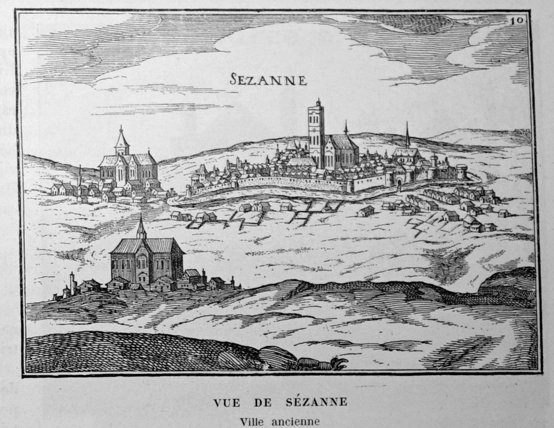 publié dans le "Revue régionale illustrée".